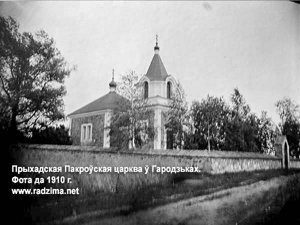 Беларуская (тарашкевіца): Гародзькі (Harodźki). Пакроўская царква-мураўёўка